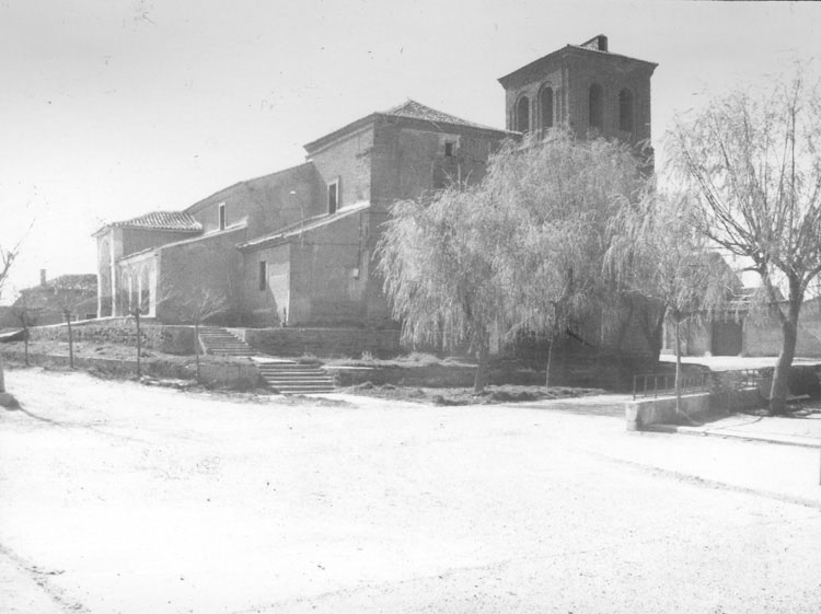 Iglesia parroquial de Nuestra Señora de la Asunción - La Unión de Campos (Valladolid) - álbum 200 x 140 - Fotografía. Papel 115 x 85 B/N